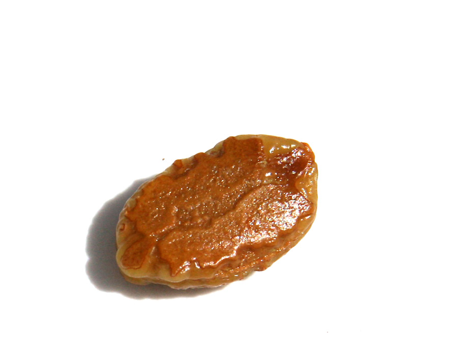 graine fraiche de margose